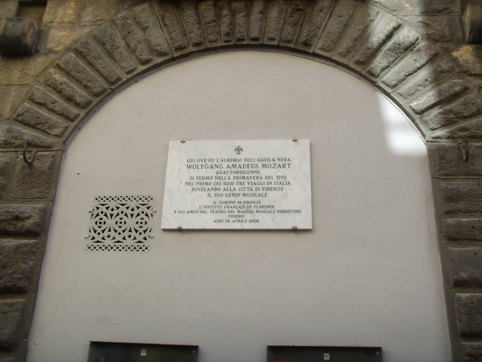 Palazzo del bembo, targa mozart